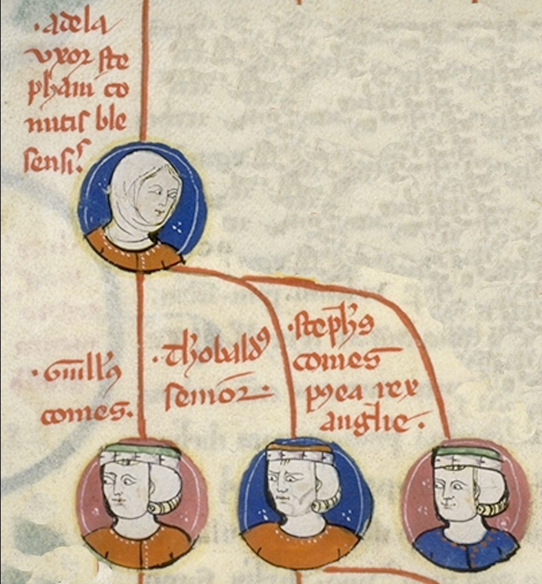 Adela of Normandy ; for full reference data